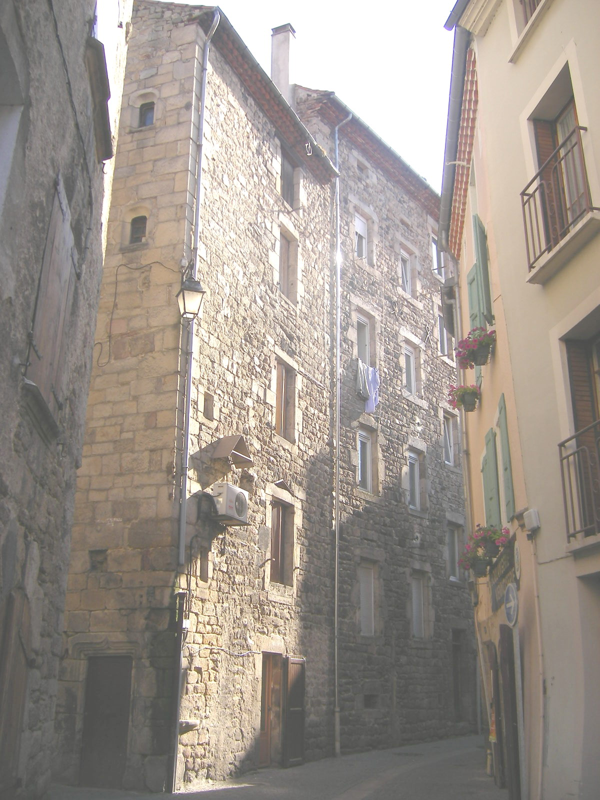 Langogne